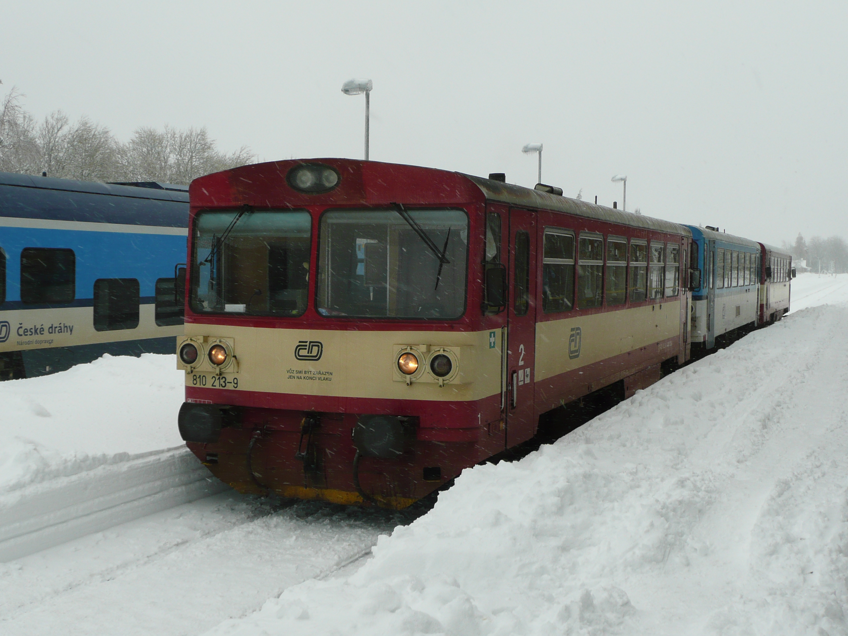 810 213 vor Personenzug in Moldava v krus. Horach